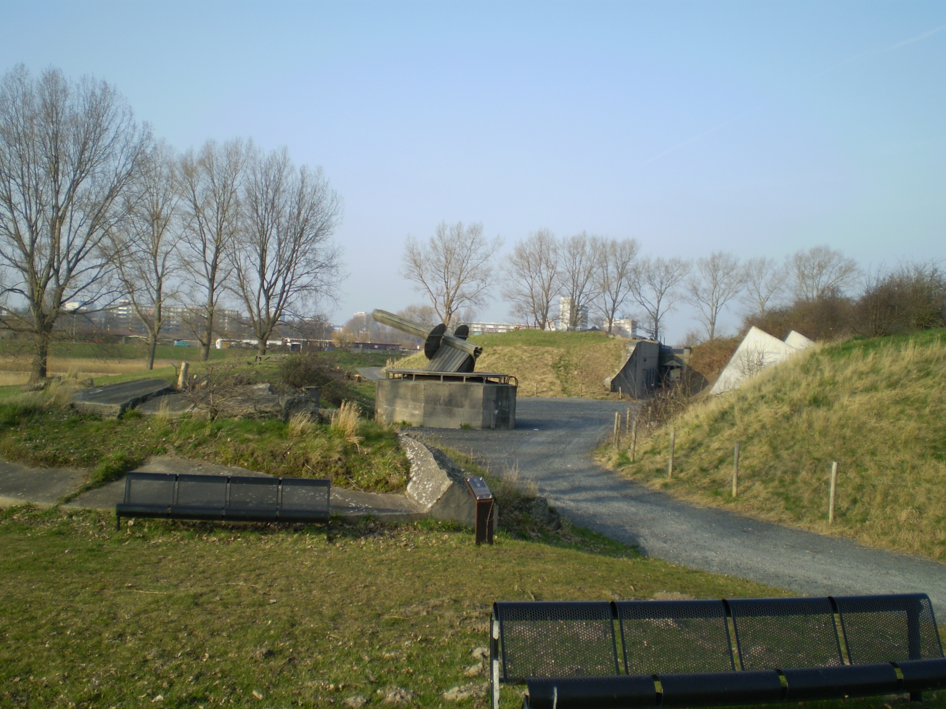 Stelling van Amsterdam: Fort bij Vijfhuizen, open geschutbedding door Duitse bezetter, links achter de bank: Restanten van het hefkoepelgebouw